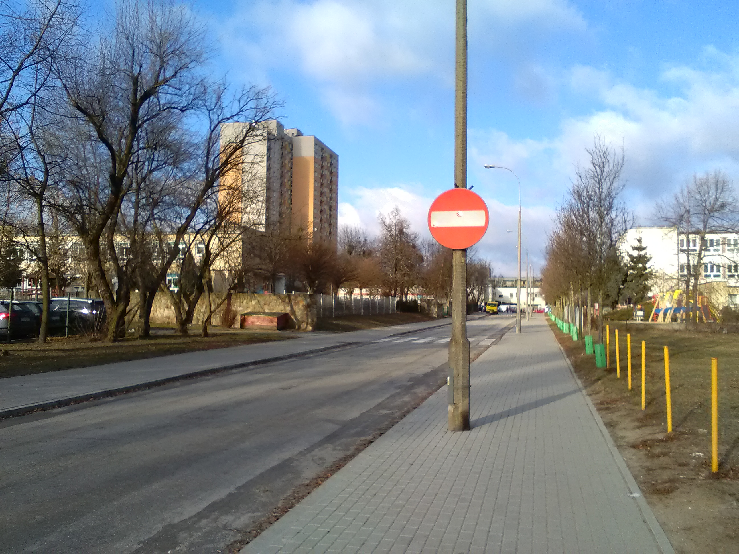 Osiedle Rzeczypospolitej w Poznaniu, Ulica Wyzwolenia.